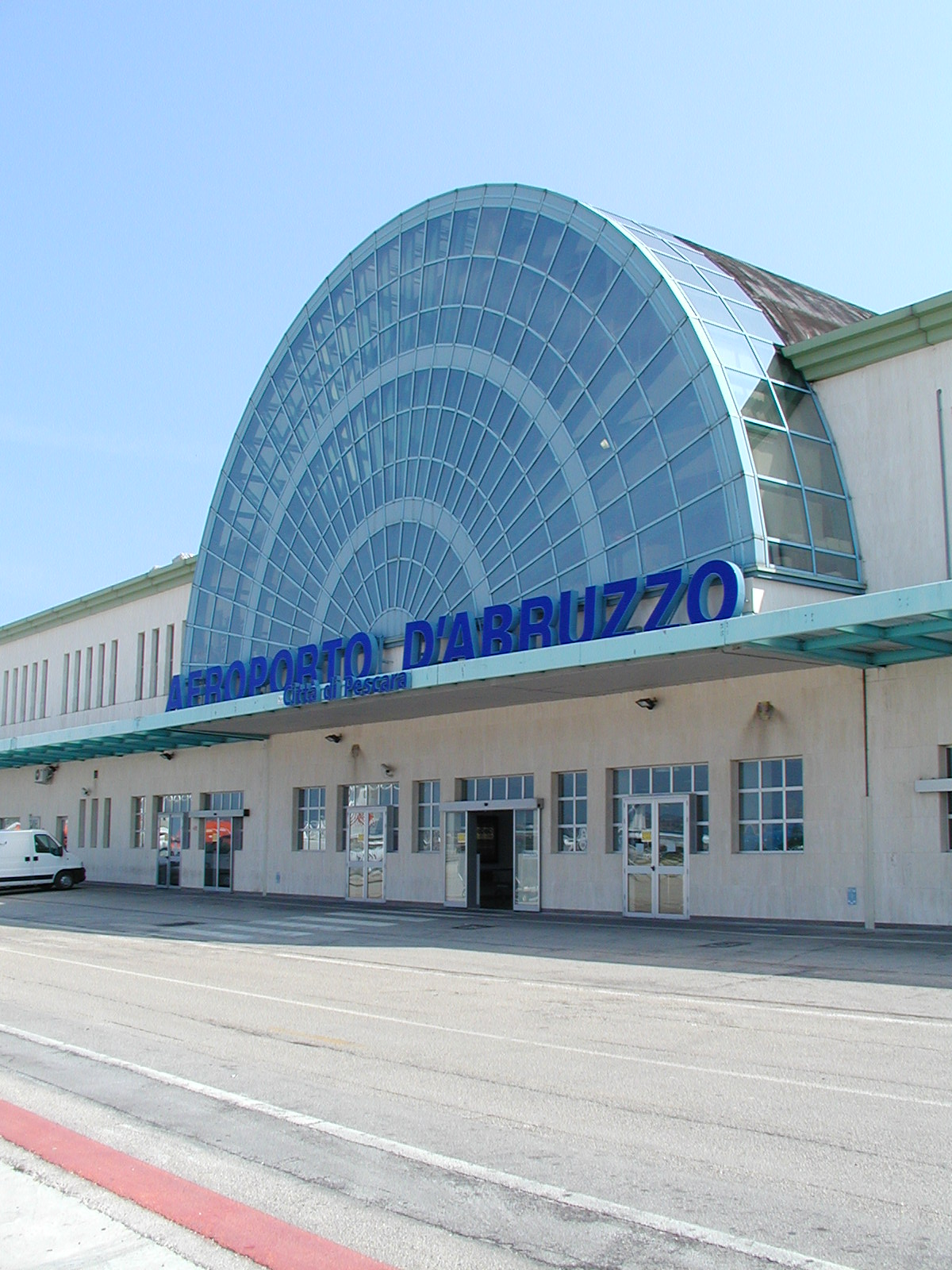 Willkommen auf den "Aeroporto d'Abruzzo"